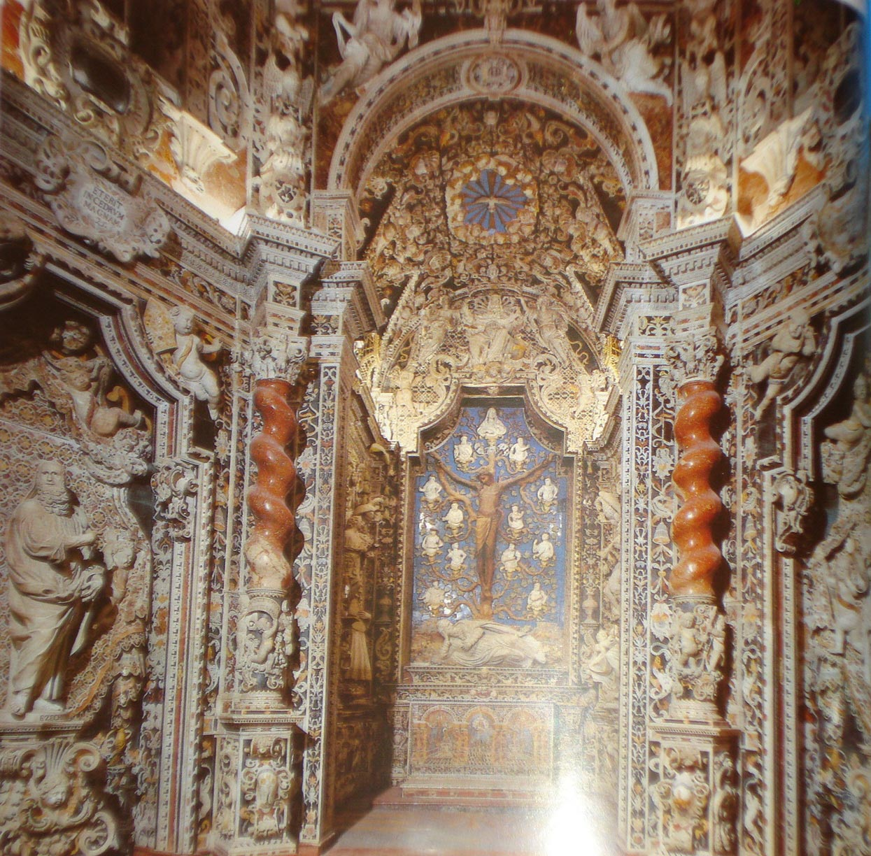 Cattedrale di Monreale. Капелла_Распятия (Монреале). Crucifixtion chapel